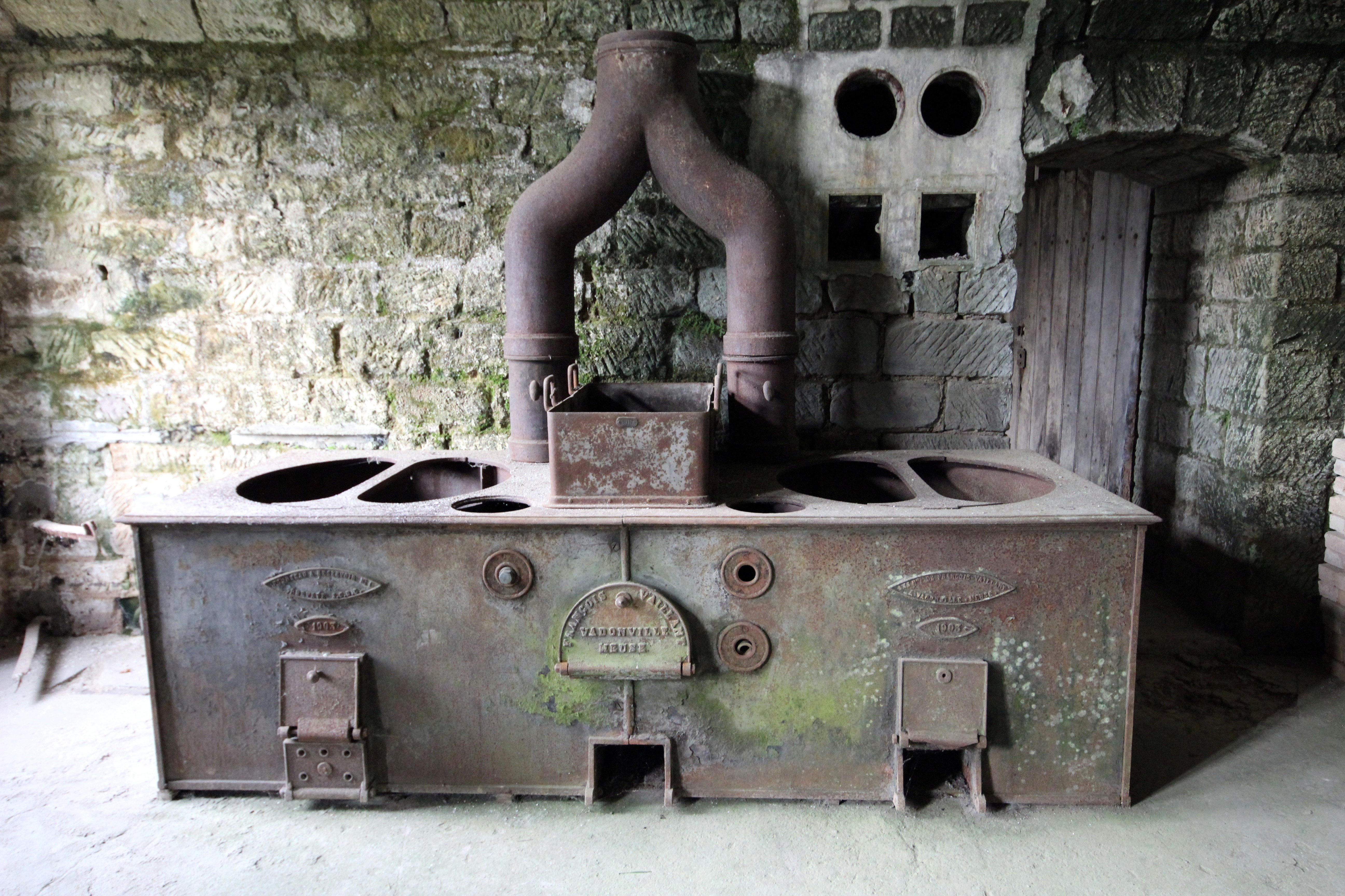 La cuisinière François Vaillant dans la pièce voisine du M de l’artillerie du fort de Bois l'Abbé